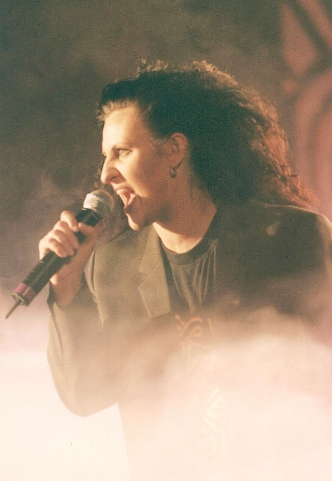 Kayah